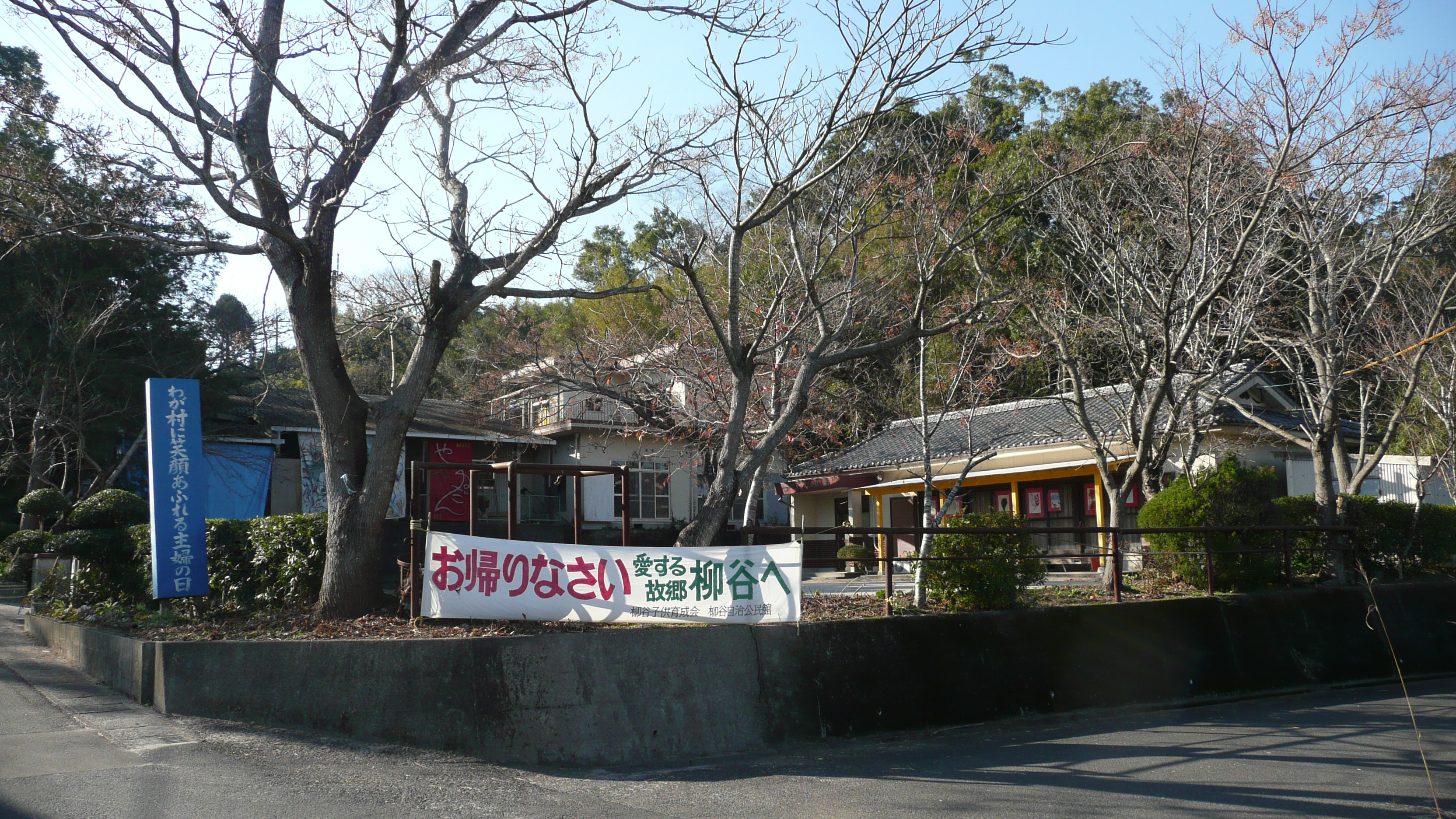 柳谷自治公民館（鹿児島県鹿屋市串良町柳谷集落）